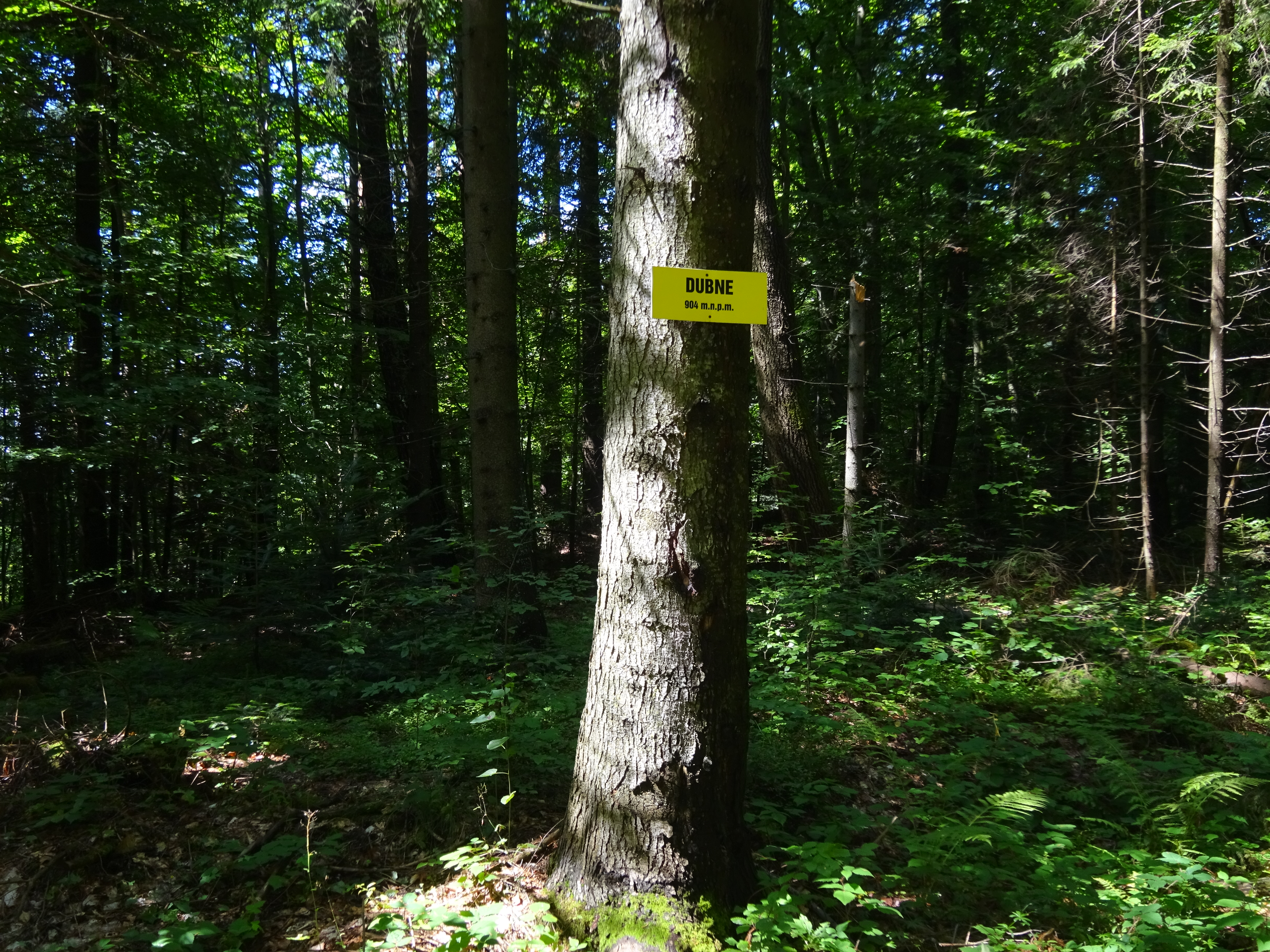 Tabliczka na szczycie Dubnego w Górach Leluchowskich, w Beskidzie Sądeckim. 2019